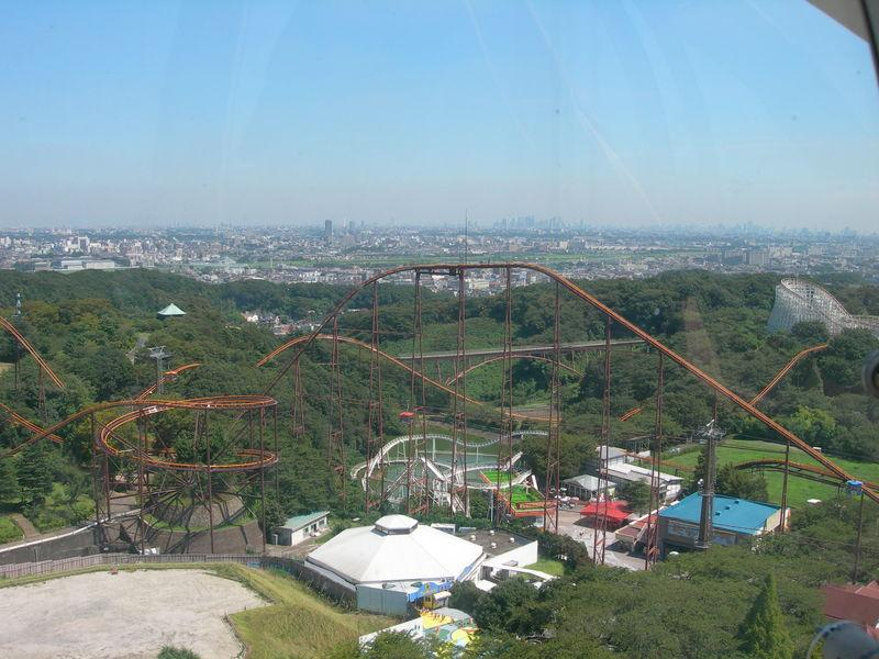 Bandit